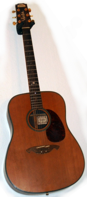 Western-Gitarre Vester VDN 735 "Traditional"